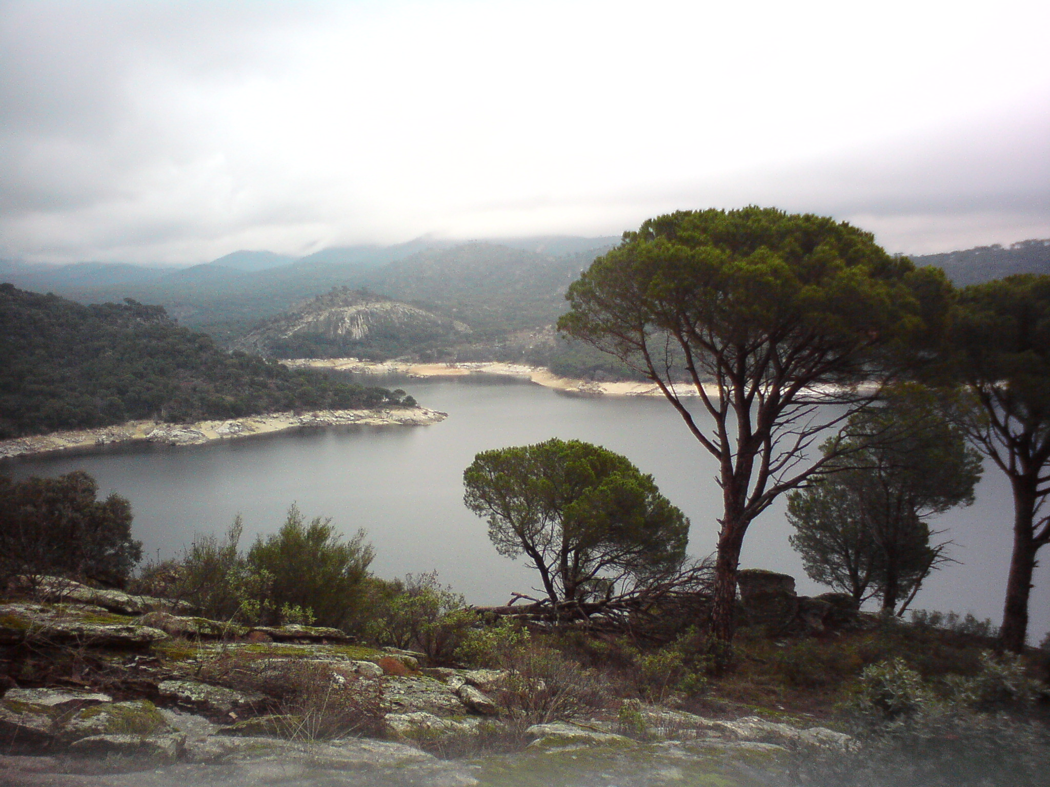 Embalse de San Juan, España.